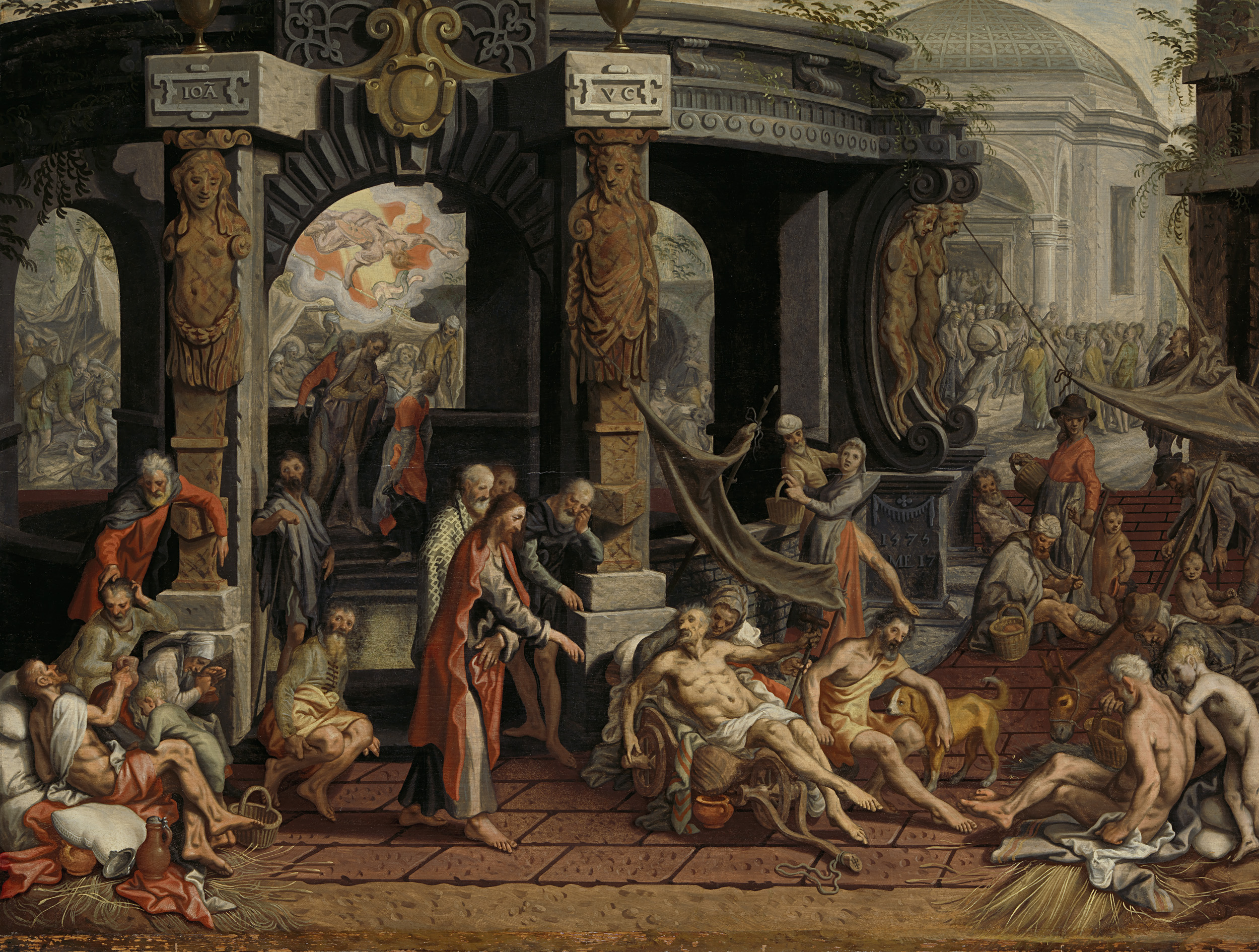 De genezing van de lamme te Bethesda (Johannes 5:1-16). Christus staat voor een rijk gedecoreerde poort, waarvoor zich een groot aantal zieken bevindt. Achter de poort is te zien hoe een engel in de genezende bron duikt.